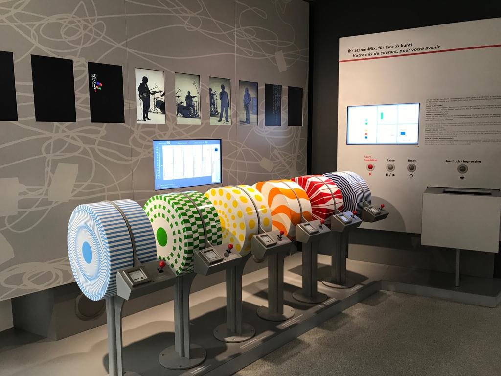 Bild vom Energie- Mixer aus dem Axporama